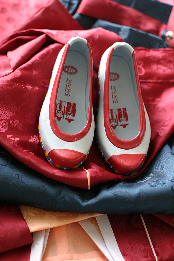 Korean shoes